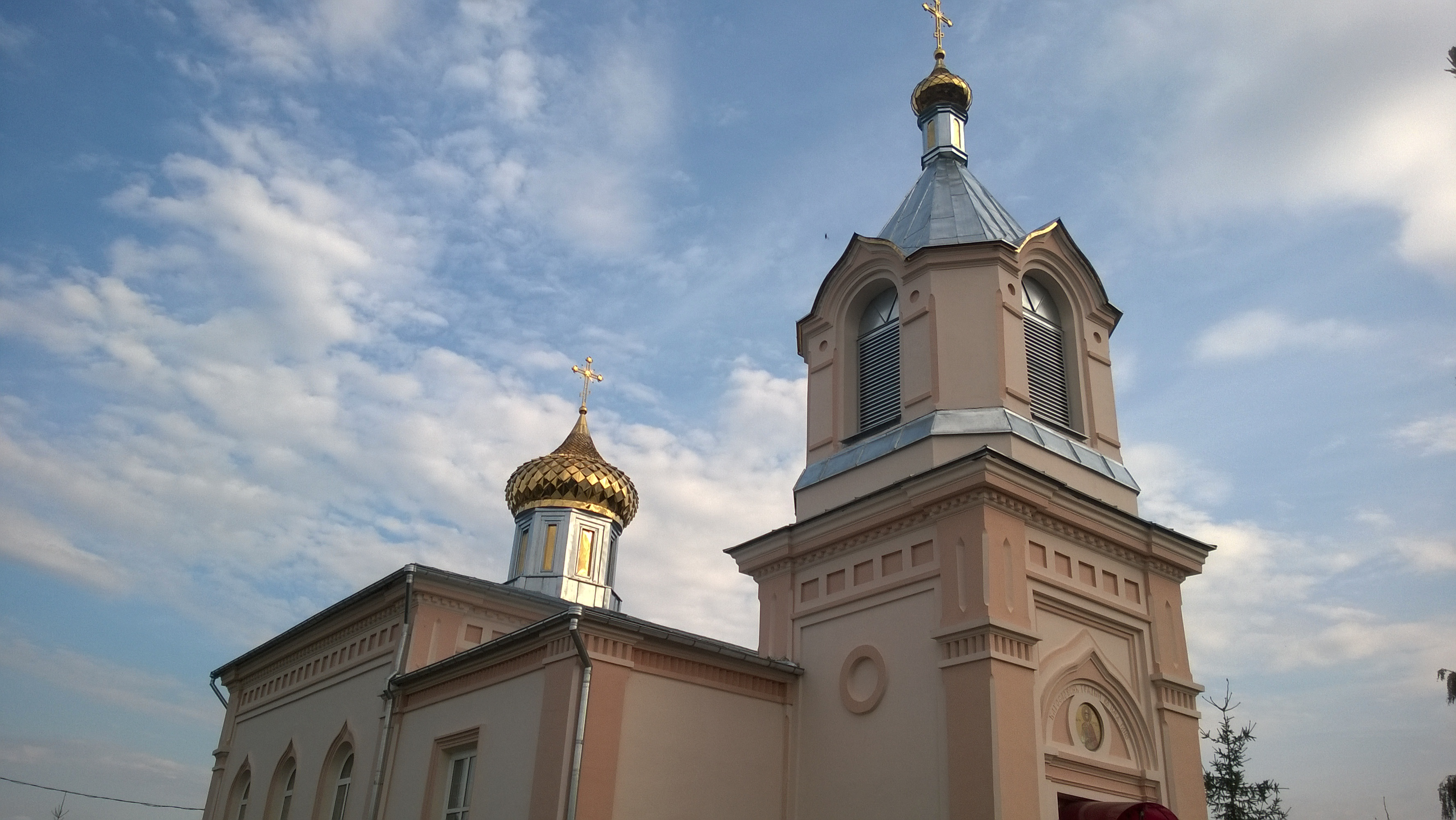 Indura, Belarus